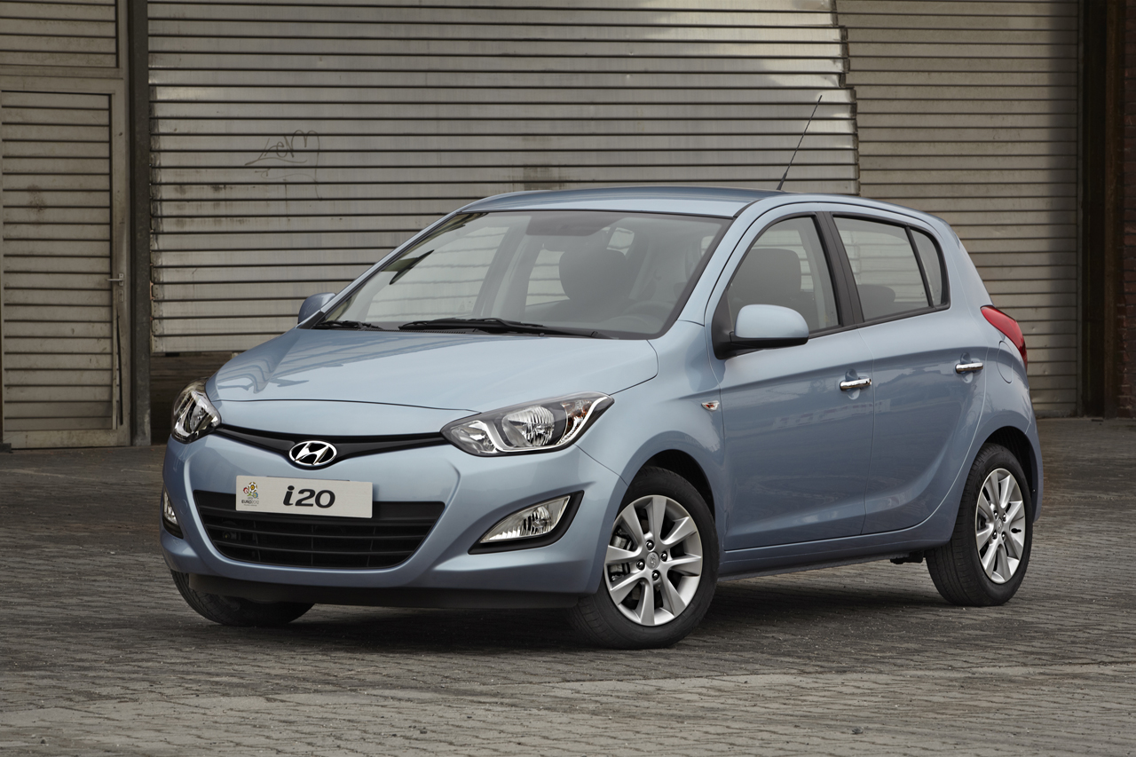 Hyundai i20 ice blue facelift